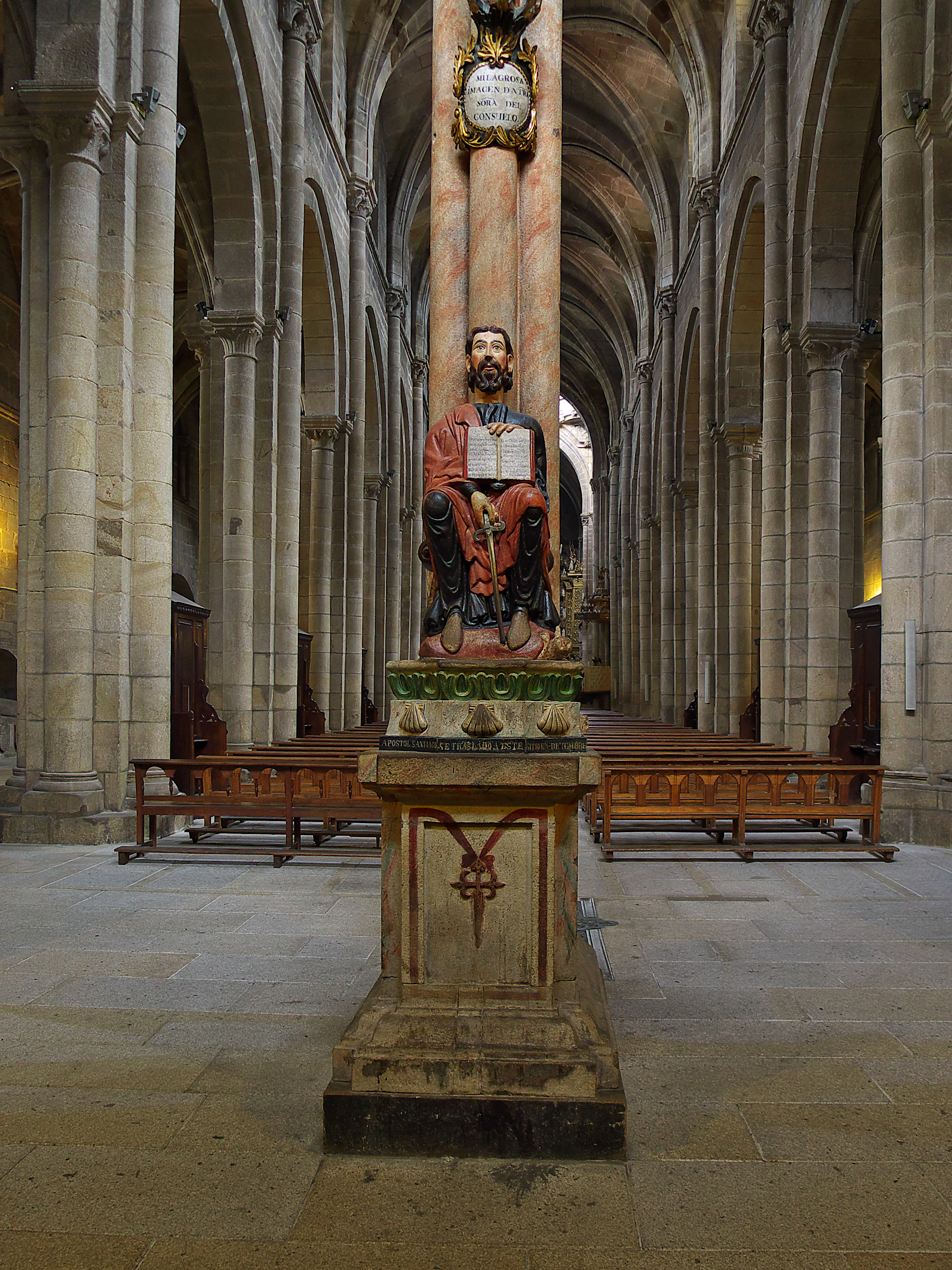 Parteluz del Pórtico del Paraiso (Catedral de San Martín, Orense). La imagen (s. XIII) con cruz de hierro nos recuerda la legendaria intervención en la batalla de Clavijo.